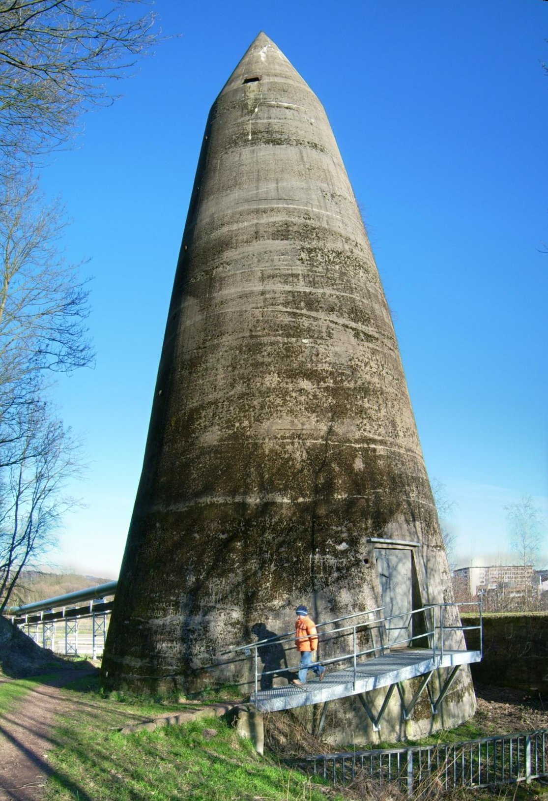 Hochbunker in Neunkirchen (Saar)